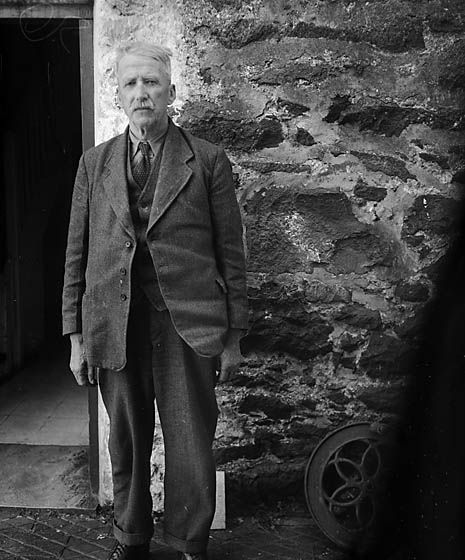 Teitl Cymraeg/Welsh title: Y bardd Robert Evans (Cybi), tu allan i’w gartref, Bryn Eithin, Llangybi Ffotograffydd/Photographer: Geoff Charles (1909-2002) Dyddiad/Date: August 5, 1955. Cyfrwng/Medium: Negydd ffilm / Film negative Cyfeiriad/Reference: (gch16234) Rhif cofnod / Record no.: 3370779 Rhagor o wybodaeth am gasgliad Geoff Charles yn Llyfrgell Genedlaethol Cymru More information about the Geoff Charles Collection at the National Library of Wales